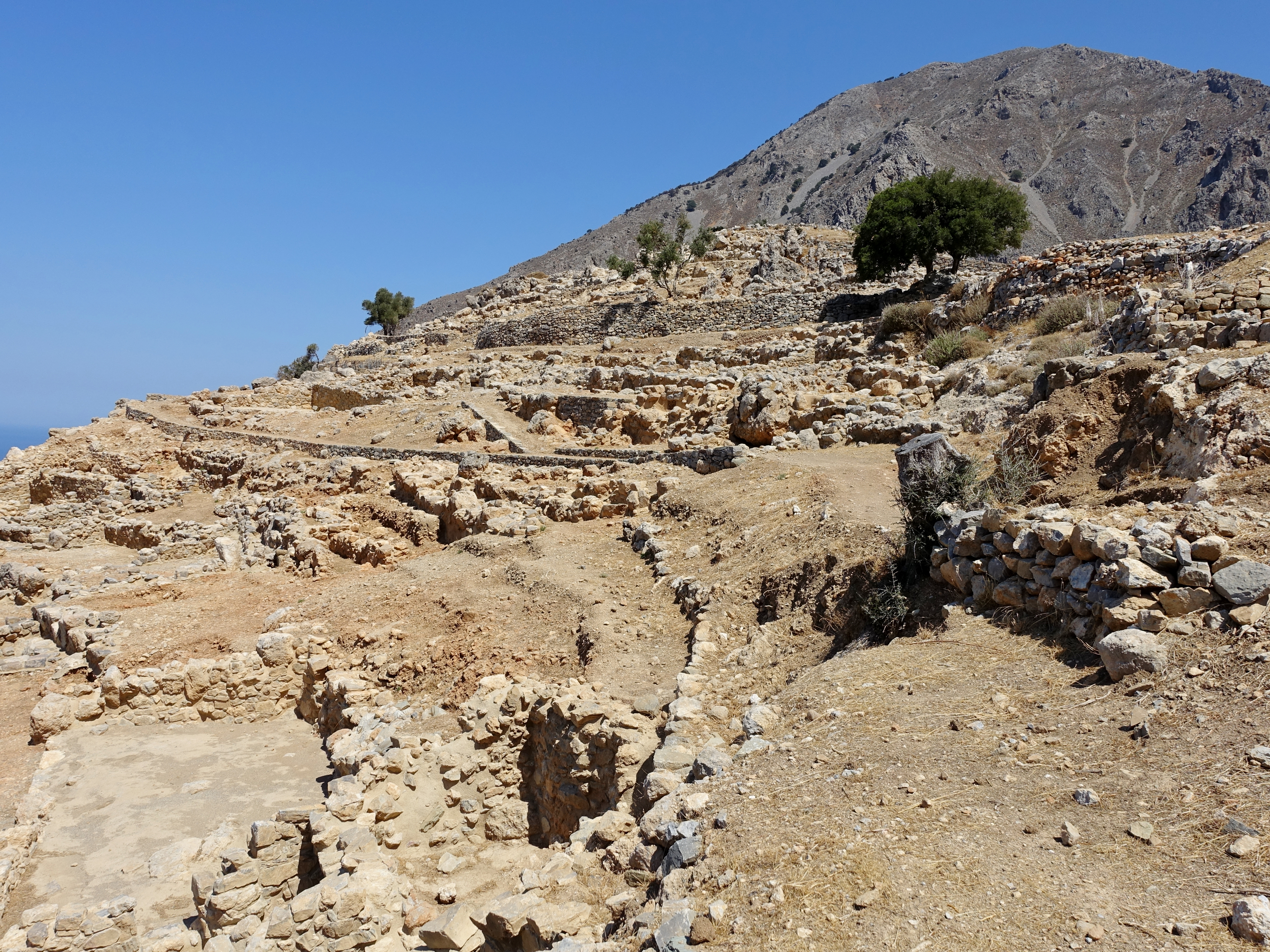 Ausgrabungsstätte von Azorias (Αζωριάς) bei Kavousi, Gemeinde Ierapetra, Regionalbezirk Lasithi, Kreta, Griechenland